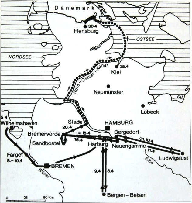 Weg der Neuengammer KZ-Häftlinge im April 1945